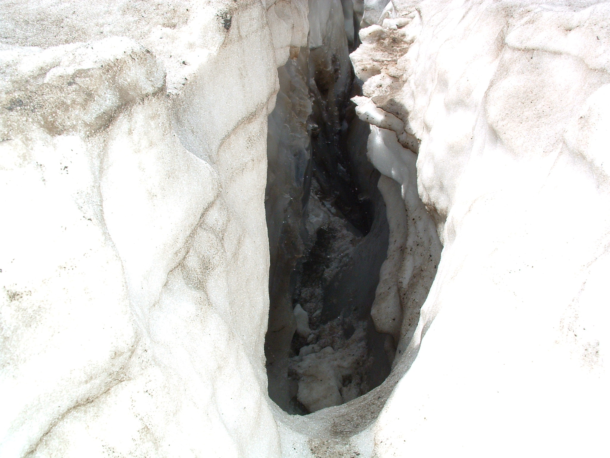 Fenditura ghiacciaio Scais